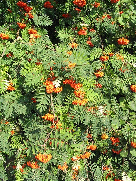 Sorbus aucuparia L. (sorbier des oiseleurs) Photo prise à Abbeville en août 2004 Jean Tosti 08/2004